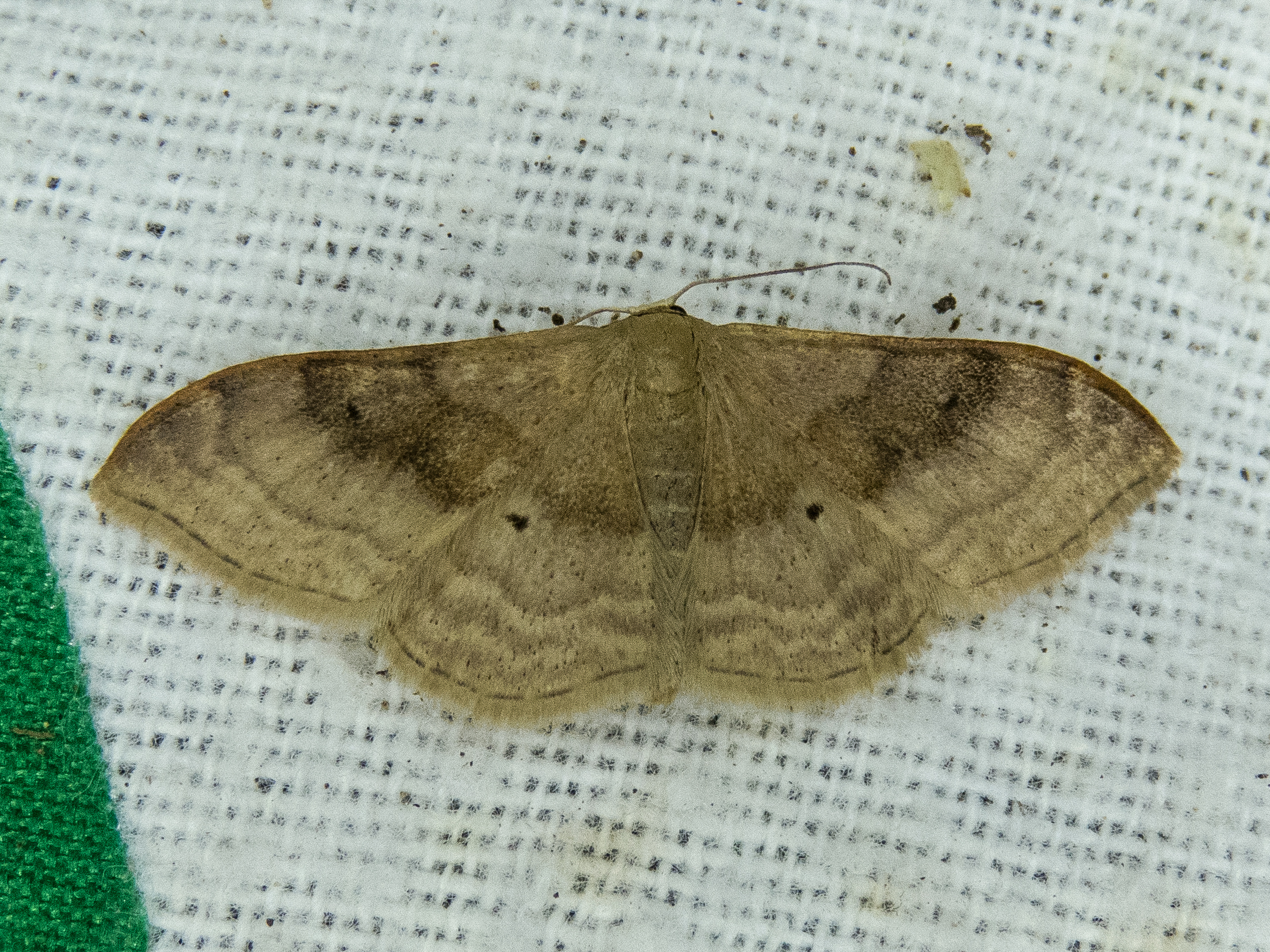 Idaea degeneraria